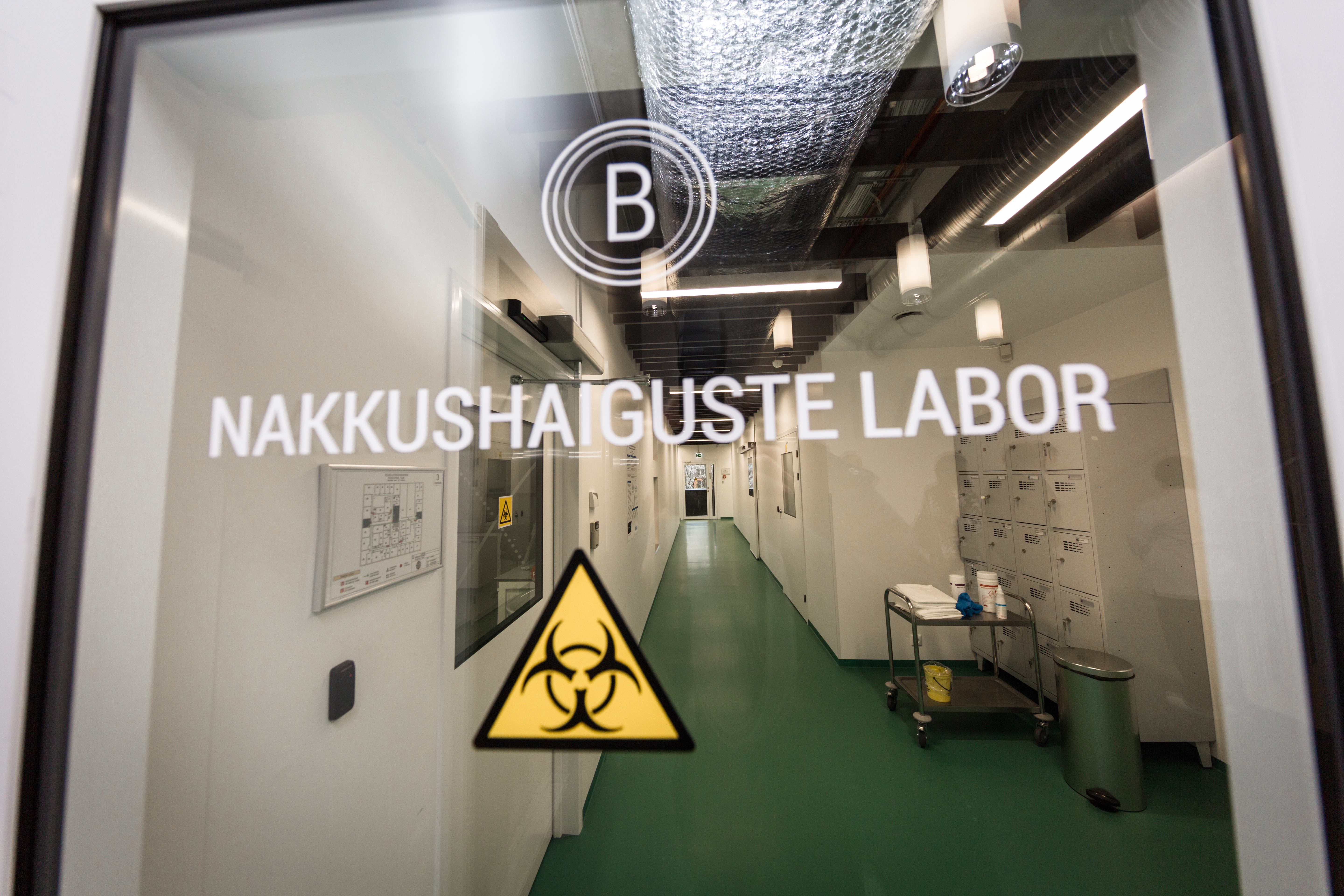 Terviseameti nakkushaiguste labor